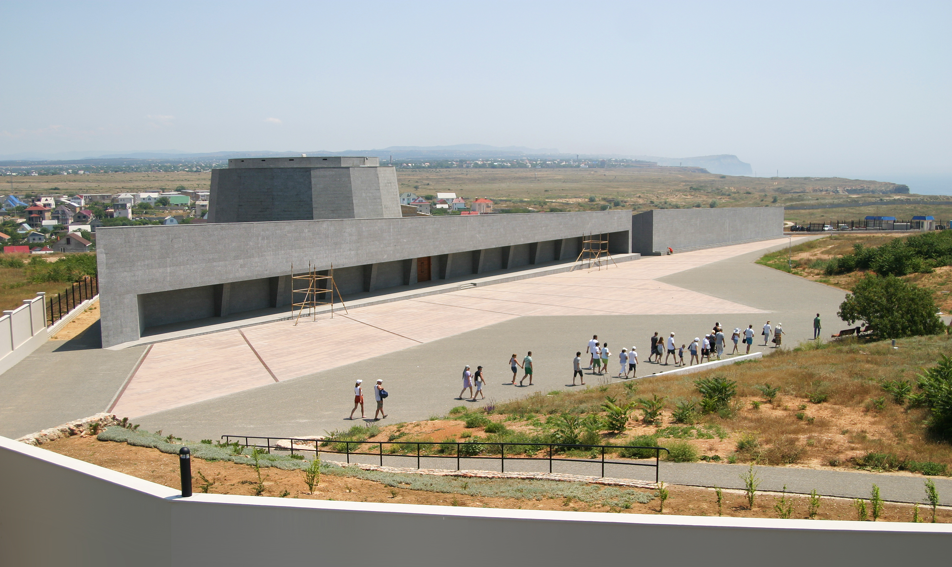 Пантеон памяти последним защитникам Севастополя